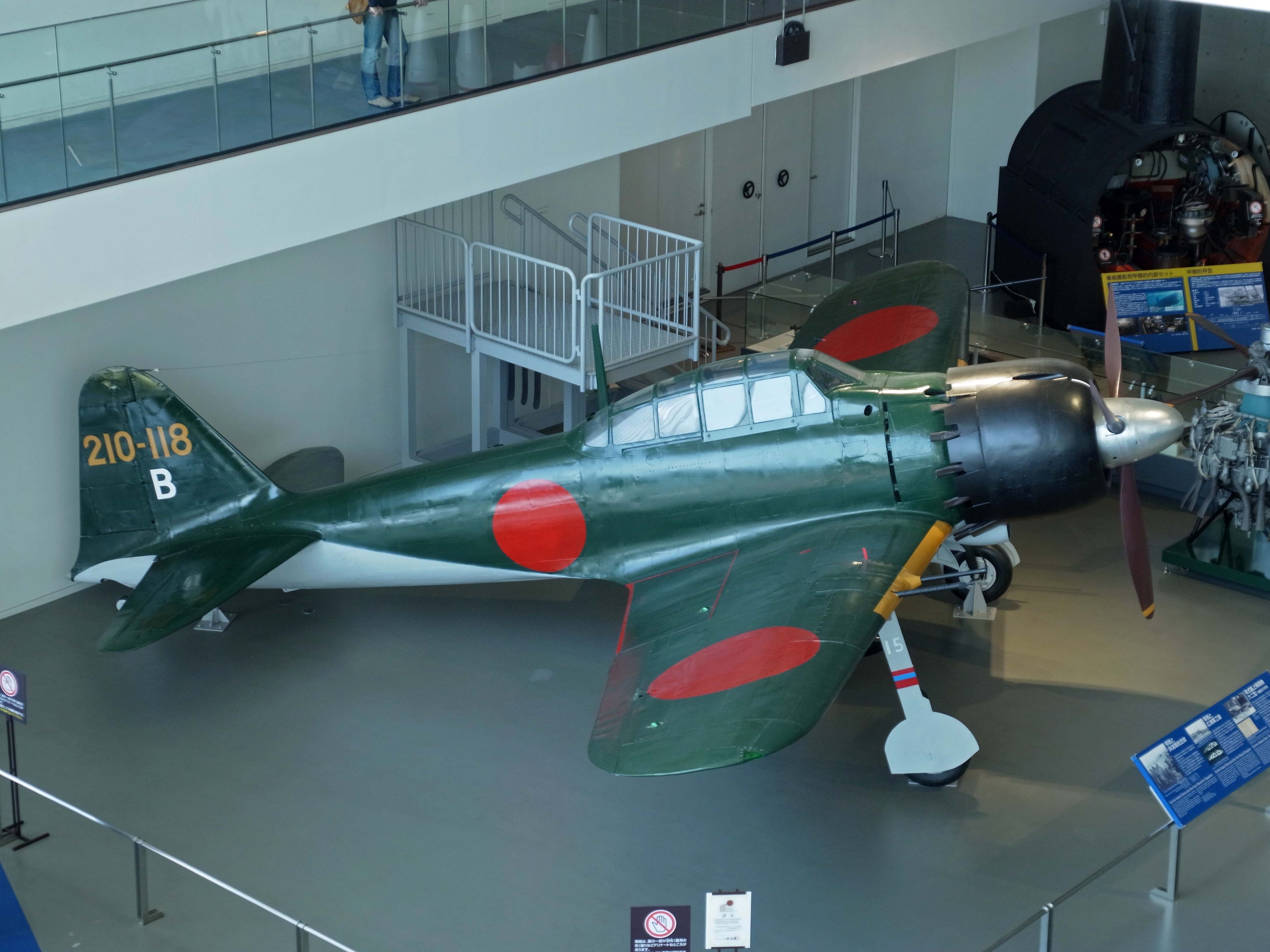 Mitsubishi A6M Zero , 零式艦上戦闘機 六二型